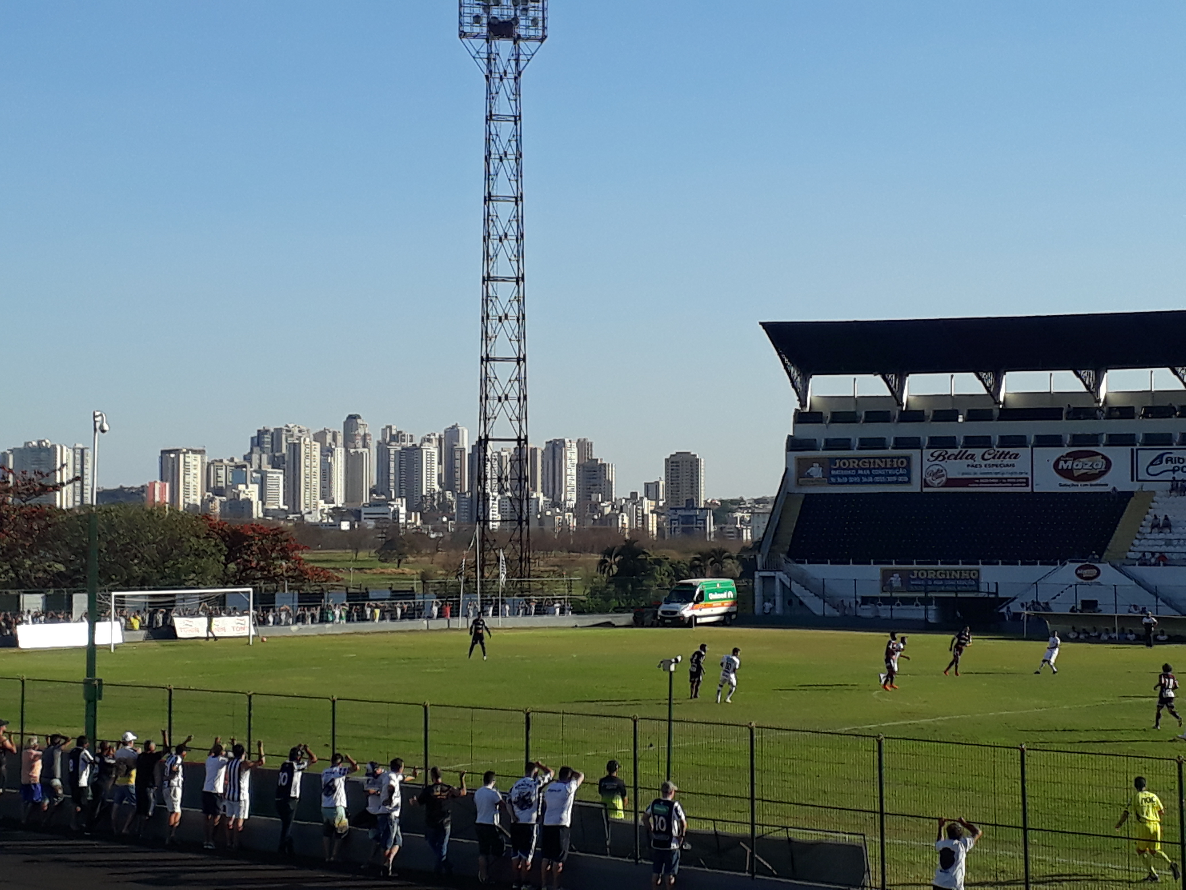 Jogo realizado pela Copa Paulista 2019, entre Comercial x Ferroviária.